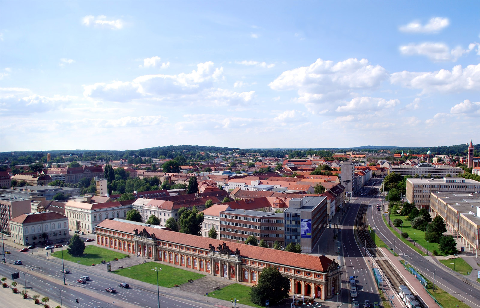 Panorama über die nördliche Innenstadt von Potsdam.